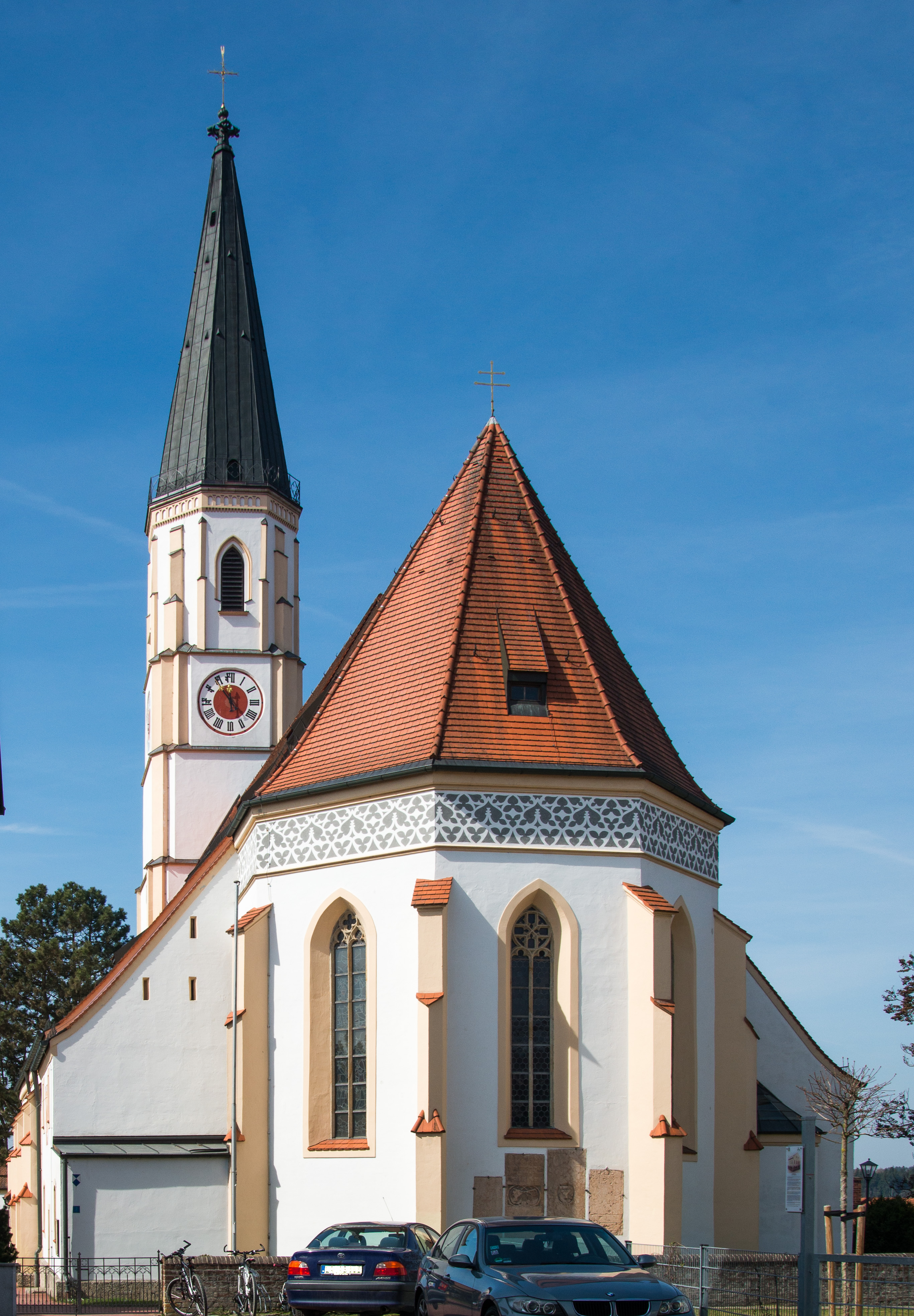 Katholische Pfarrkirche St. Petrus mit Mauer, spätgotische Staffelhalle mit Westturm, Gliederung durch Strebepfeiler und Frieszone am Chor, fünfgeschossiger Turm mit Oktogonaufsatz und Spitzhelm, in der zweiten Hälfte des 15. Jahrhunderts errichtet. This is a photograph of an architectural monument.